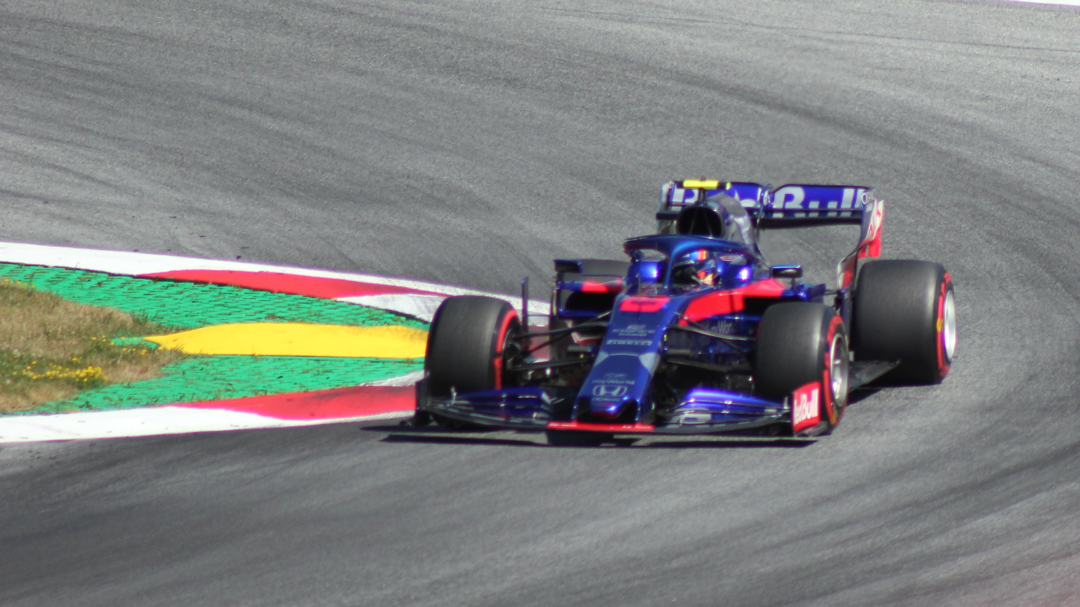 Albon beim Rennwochenende in Österreich 2019